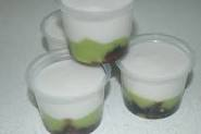 Jajanan tradisional jungkong